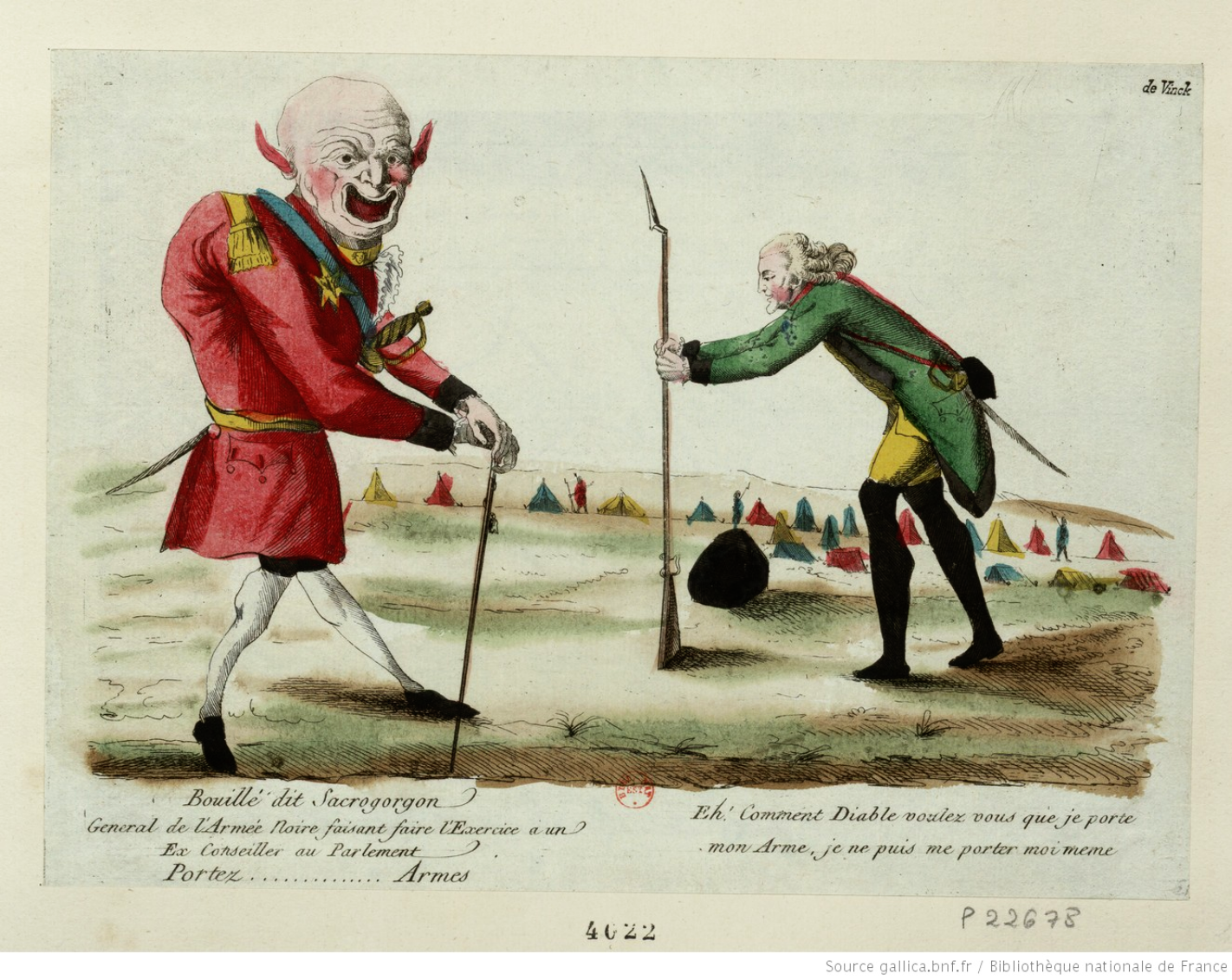 Estampe, 1791. Le texte est un dialogue entre François Claude Amour du Chariol, marquis de Bouillé, général des armées de Louis XVI, dit Sacrogorgon, alors qu'il fait faire l'exercice à un membre de son armée, dit l'armée noire : — Portez... armes, dit Bouillé Sacrogorgon, — Eh ! Comment diable voulez vous que je porte mon arme, je ne puis me porter moi-même, répond l'ex-conseiller au parlement. La qualification de Général de l'Armée noire peut signifier que le marquis de Bouillé, fidèle à Louis XVI commande, dans le contexte des débuts de la Révolution française de 1789, une armée fantastique dont les soldats trop vieux sont comme des ombres chinoises, art de l'ombre de Étienne de Silhouette, philosophe des Lumières & contrôleur général des finances de Louis XV. (D'après L'intermédiaire des chercheurs et curieux, Volume 1.